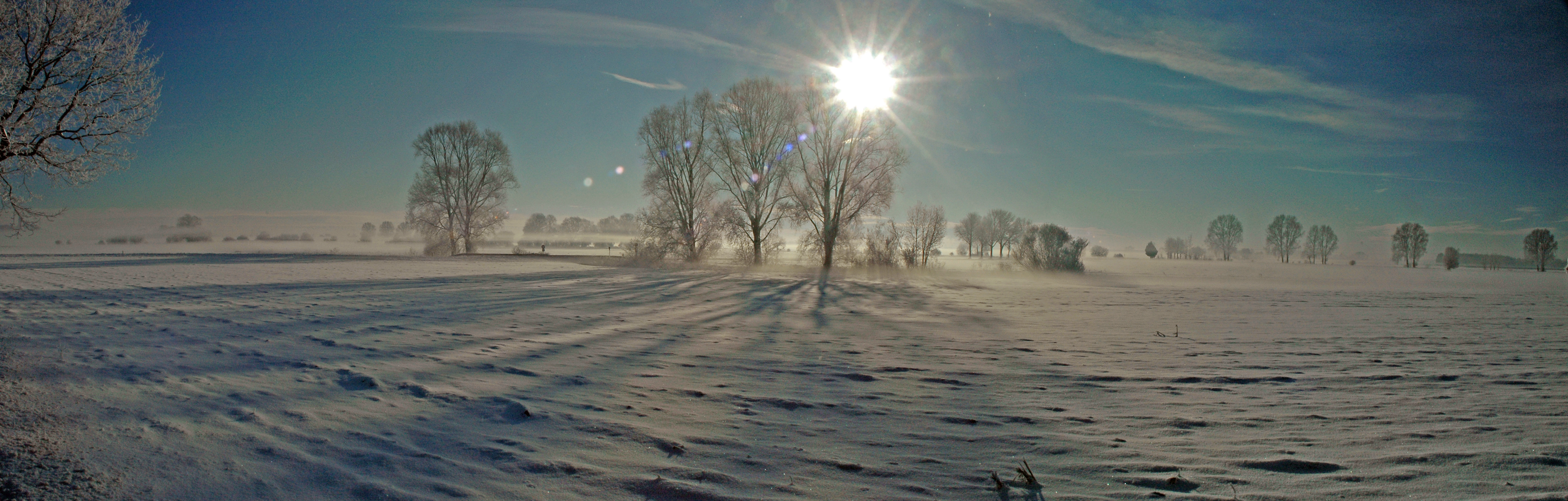 Winterlandschaft_im_Dachauer_Moos_zwischen_Amper_und_Maisach_-_Schneedunst_(II)